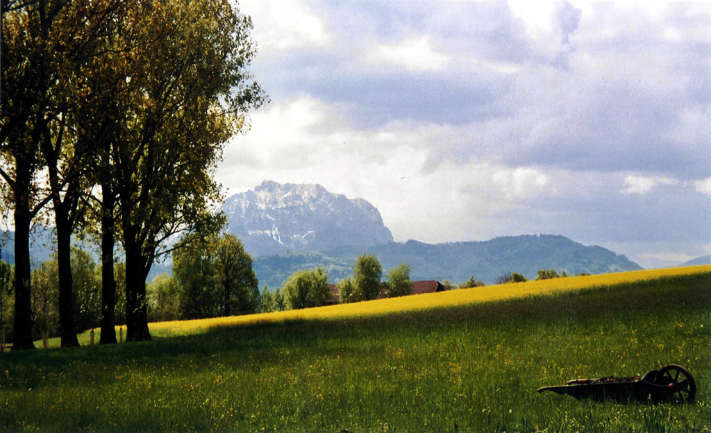 Blick auf den Traunstein (Berg) von Moorbad Gmös aus